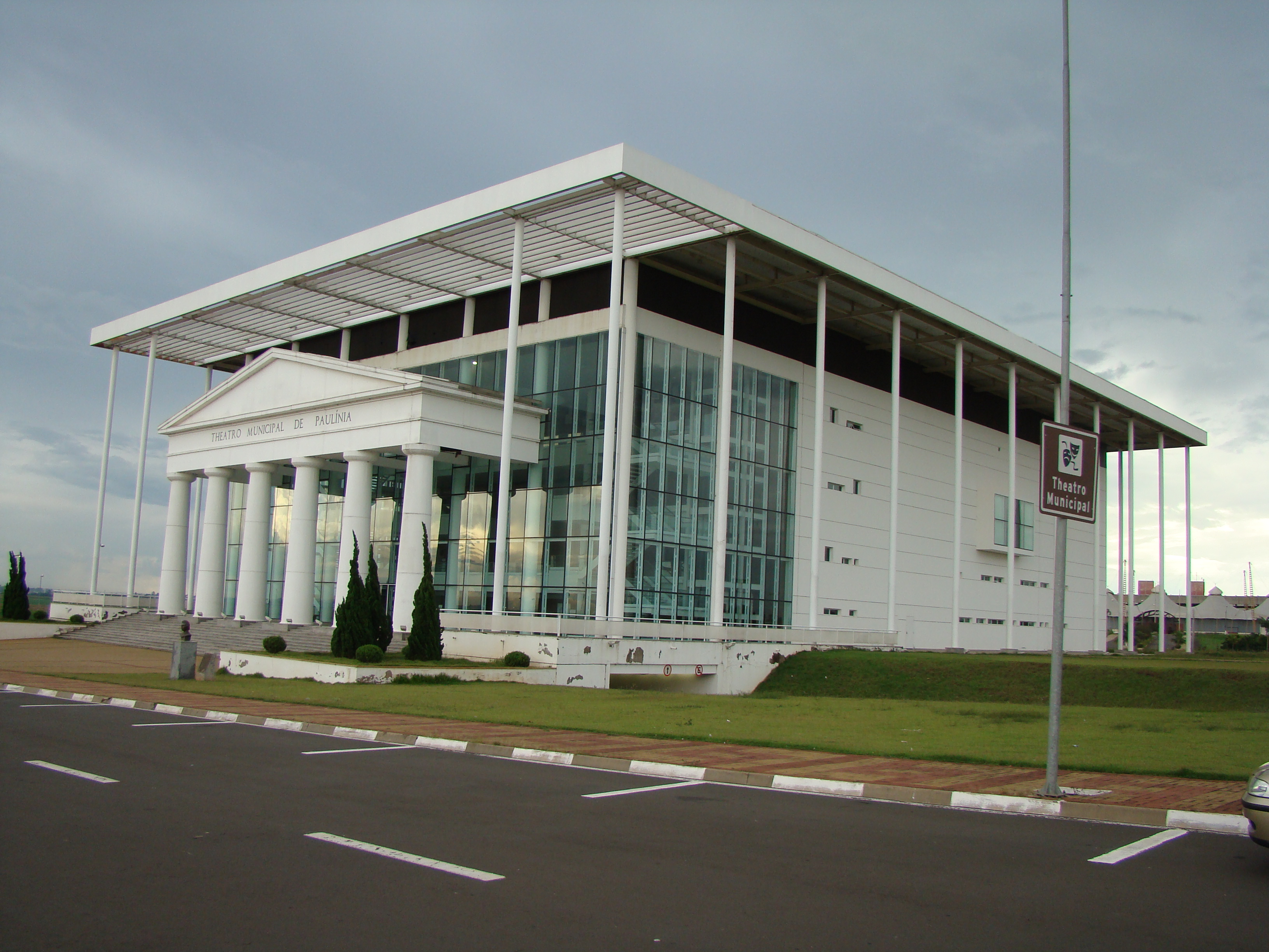 Teatro Municipal de Paulinia